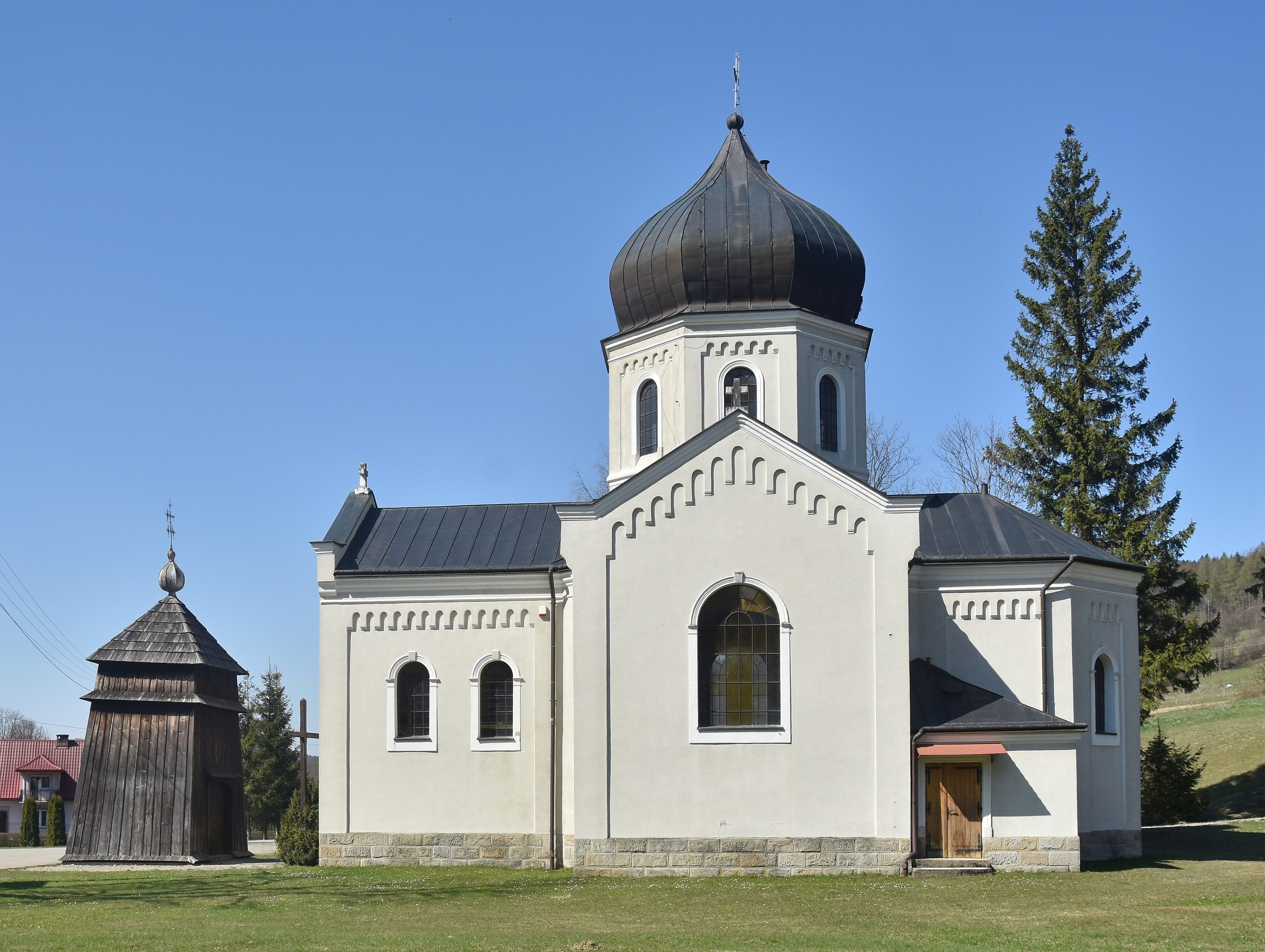 Pętna, Cerkiew św. Paraskewy w Pętnej